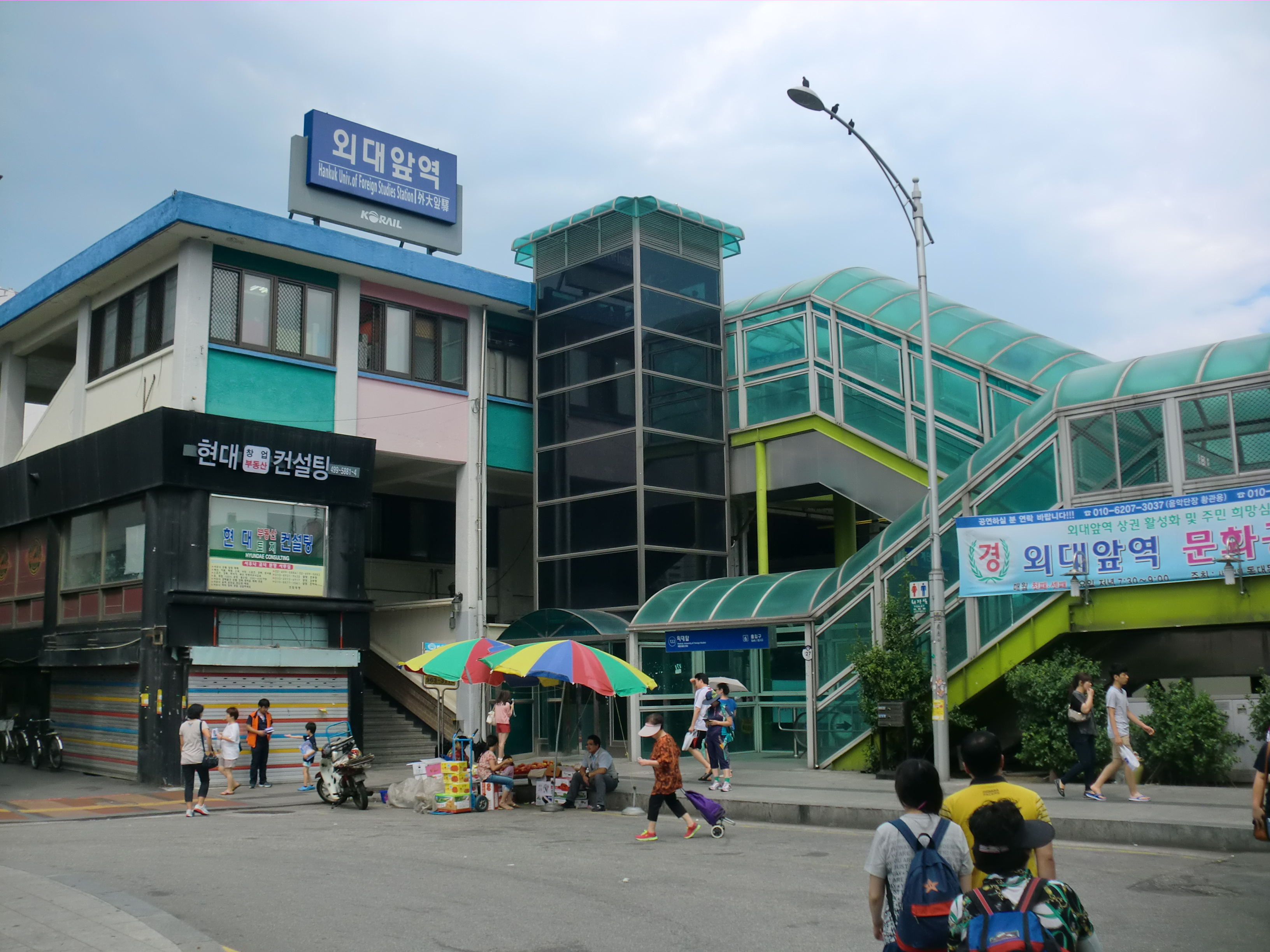 경원선에 있는 외대앞역